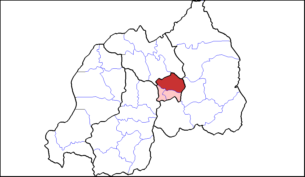 Distretto di Gasabo.